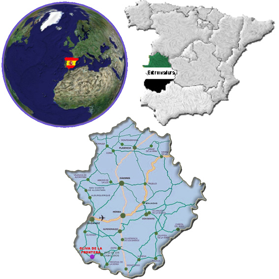 Situación de Oliva de la Fronteras respecto a la Comunidad Autónoma de Extremadura, España y Europa.